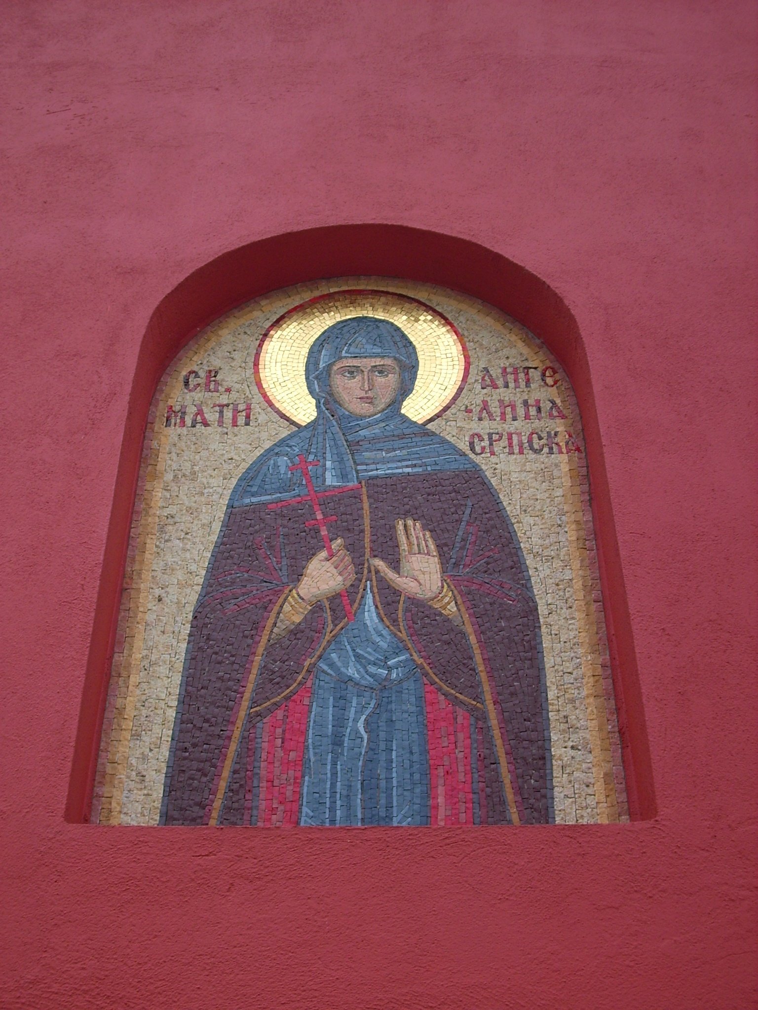 Манастир Крушедол; манастир Српске православне цркве на јужној страни Фрушке горе у Војводини.